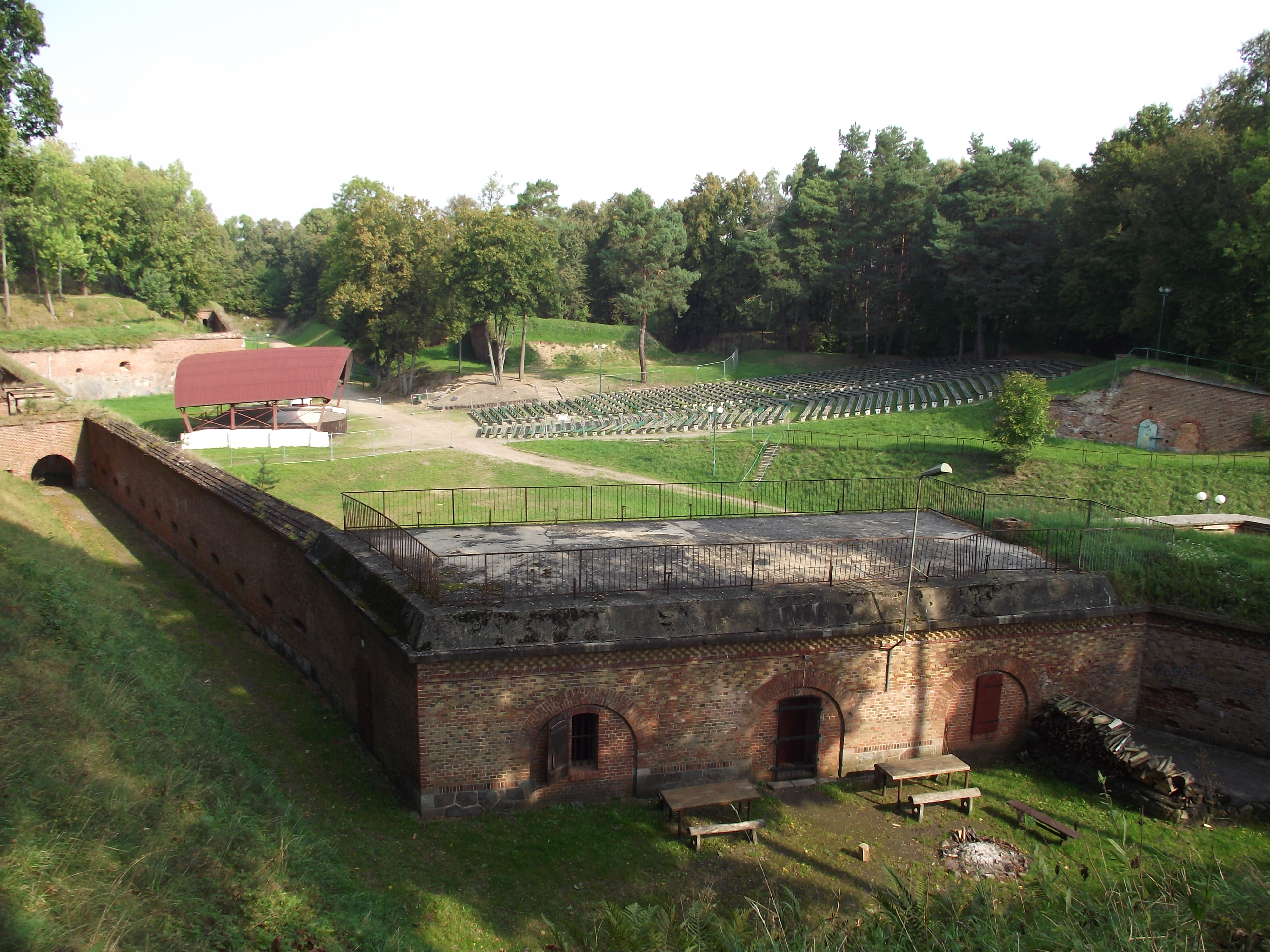 Giżycko - Twierdza Boyen (zabytek nr A-1196 z 16.03.1973 i A-984 z 06.01.1994)